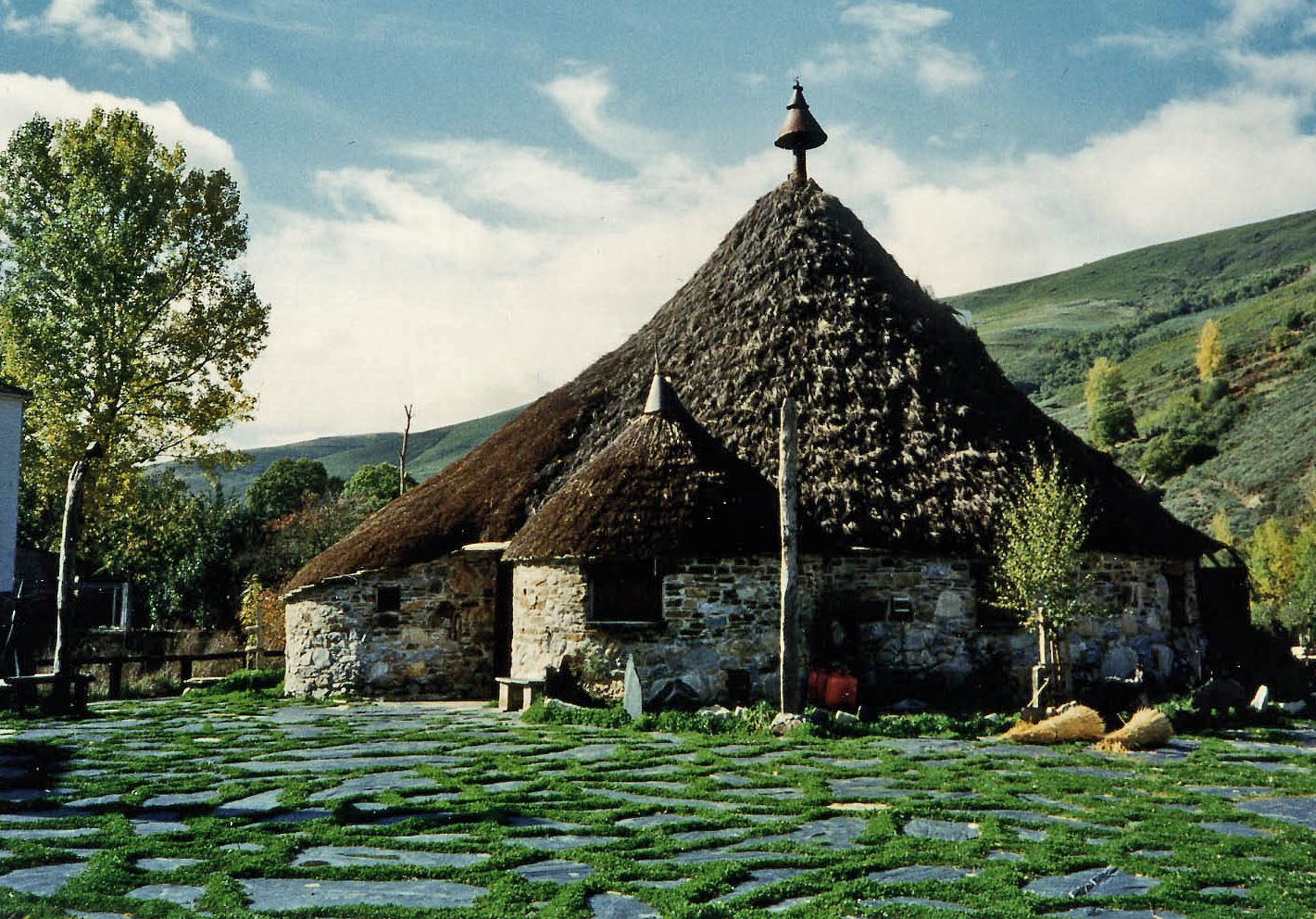 Palloza (tejado de paja) en el municipio de Balboa, comarca de El Bierzo, León, España. (Fotografía en papel)